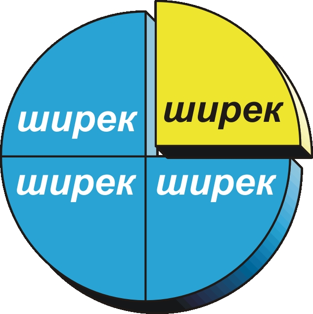 Ширек